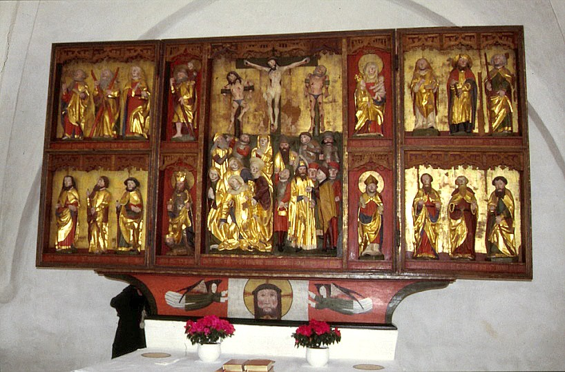 Vålse Kirke i Danmark. Altertavle